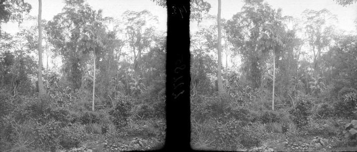 Stereonegatief. Pholidocarpus en rotan in oerbos, Saentis, Deli